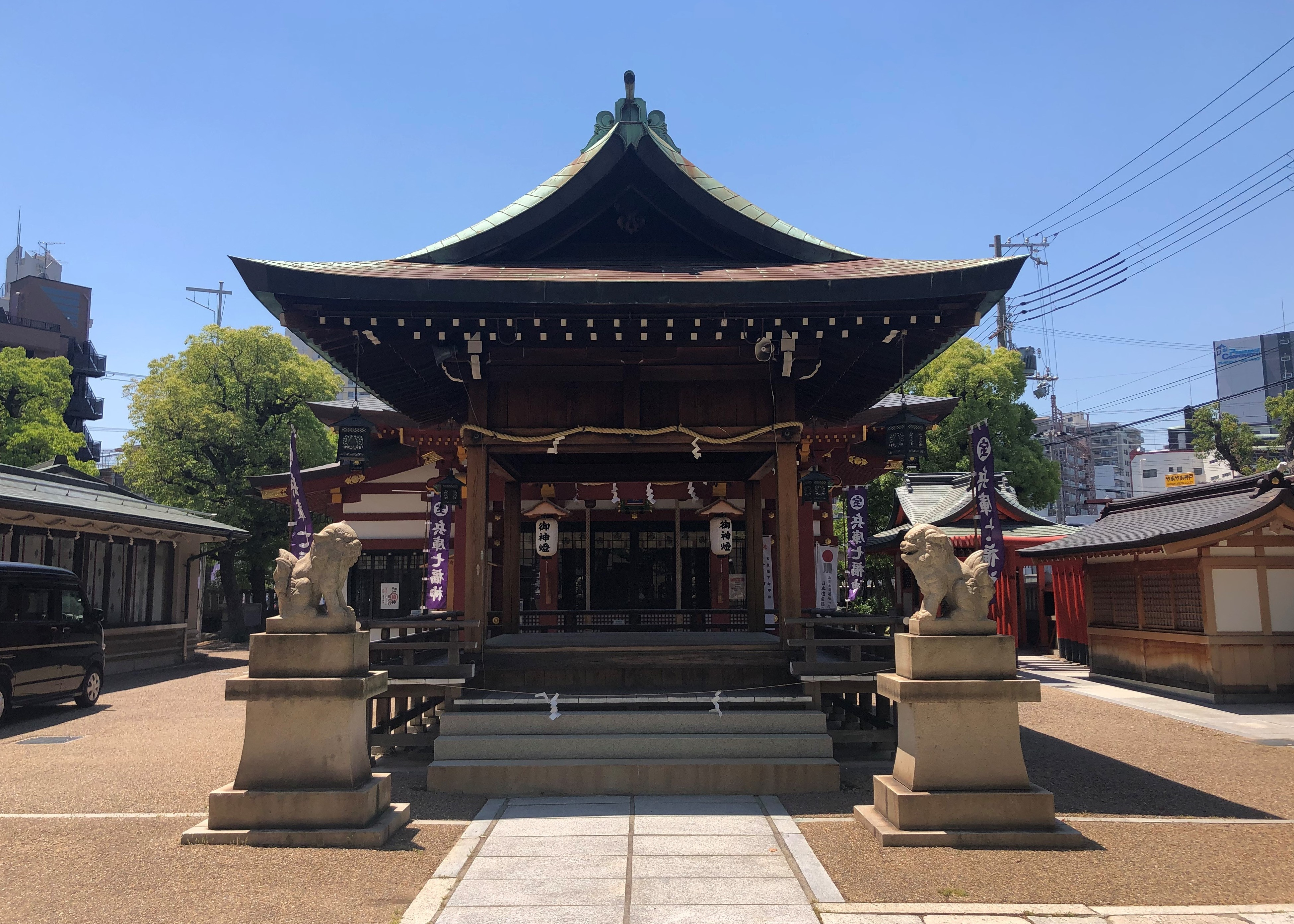 柳原蛭子神社神楽殿